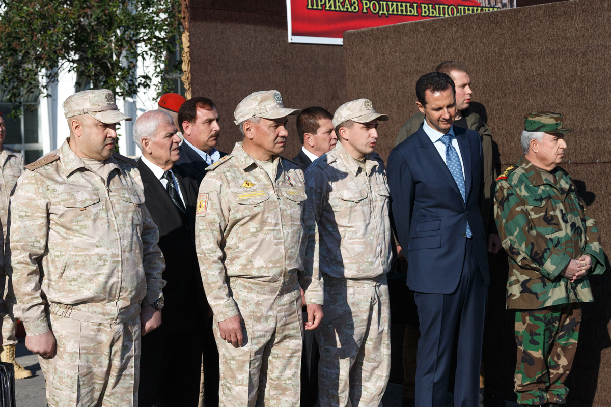 Во время посещения Президентом России Владимиром Путиным авиабазы Хмеймим в Сирии.